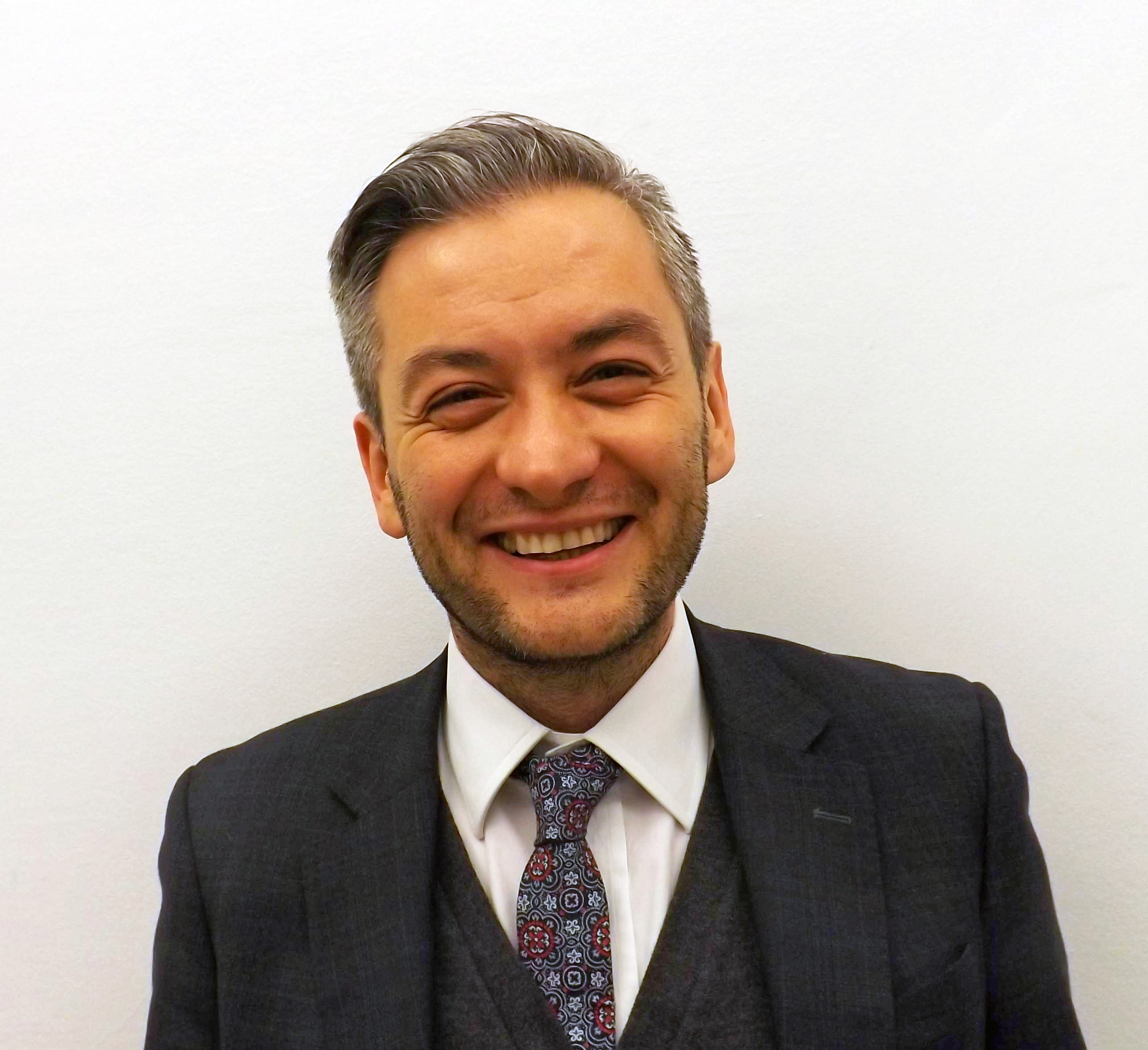 Robert Biedroń, poseł Twojego Ruchu